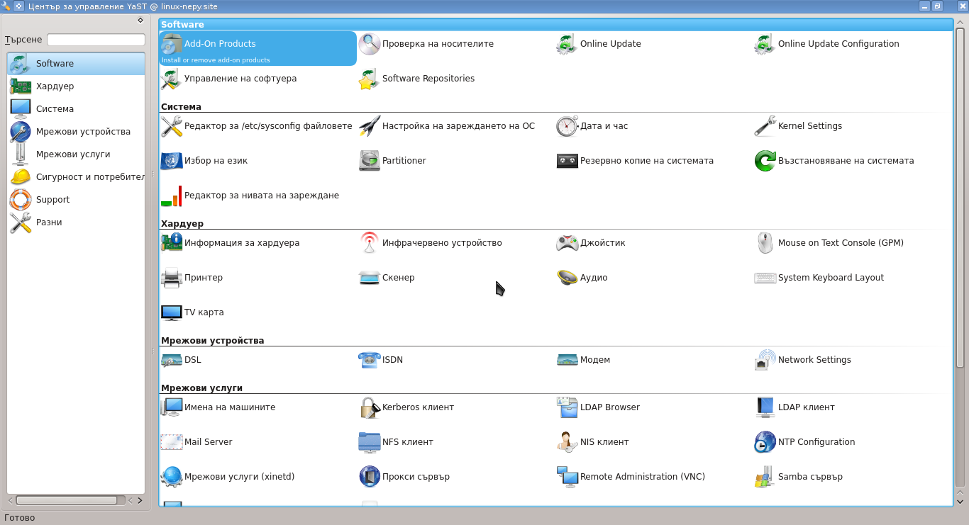 Център за управление YaST с BG меню в openSuse12.2